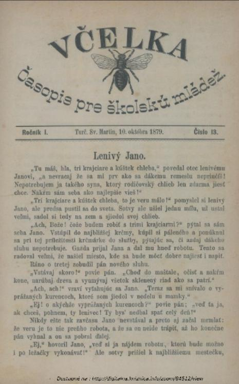 Časopis pre školskú mládež z druhej polovice 19. storočia.